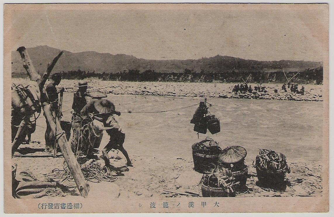 大甲溪ノ籠渡シ